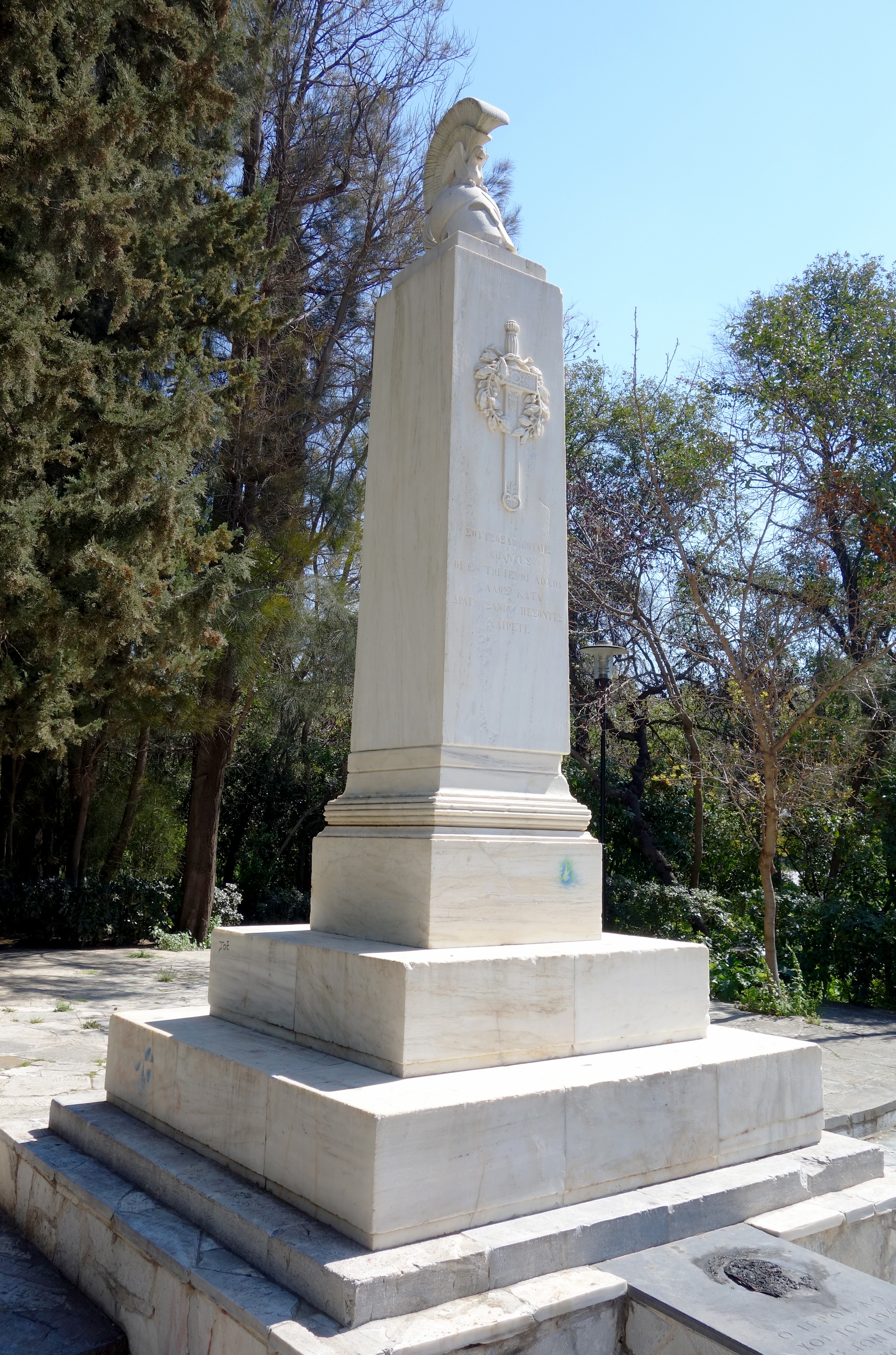 Μνημείο Ιερού Λόχου 1821, Πεδίον του Άρεως. Σε σχέδια του αρχιτέκτονα Σταμάτη Κλεάνθη (1843) ο οποίος υπήρξε Ιερολοχίτης.